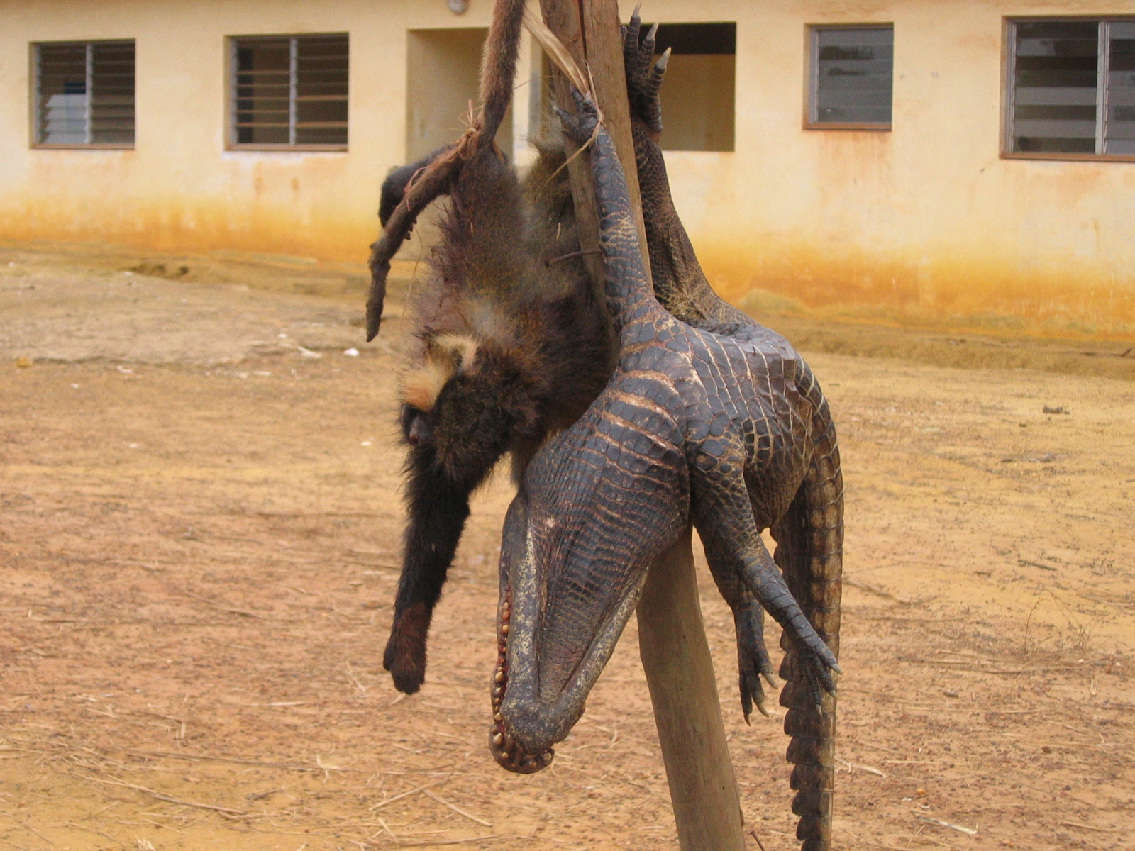 Viande de brousse en vente sur un bord de route, Gabon 2006.